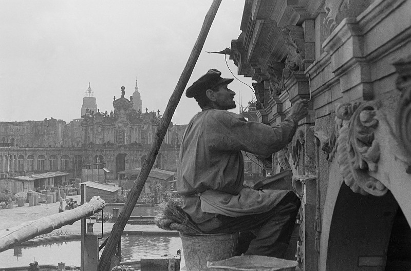 Original image description from the Deutsche FotothekSteinbildhauer bessert Sims aus